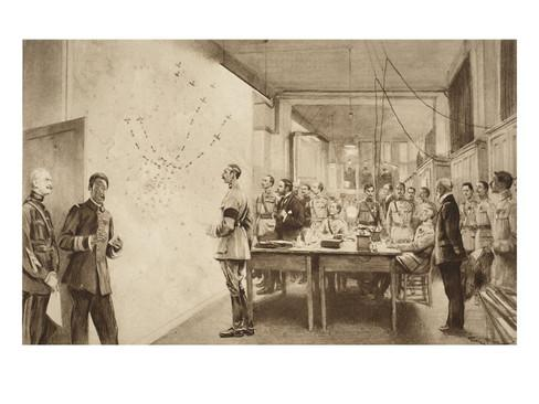 Commandant and Staff of French Department of Aviation Marking the Progress of Gotha Raid on Paris, lithography, c.1917.